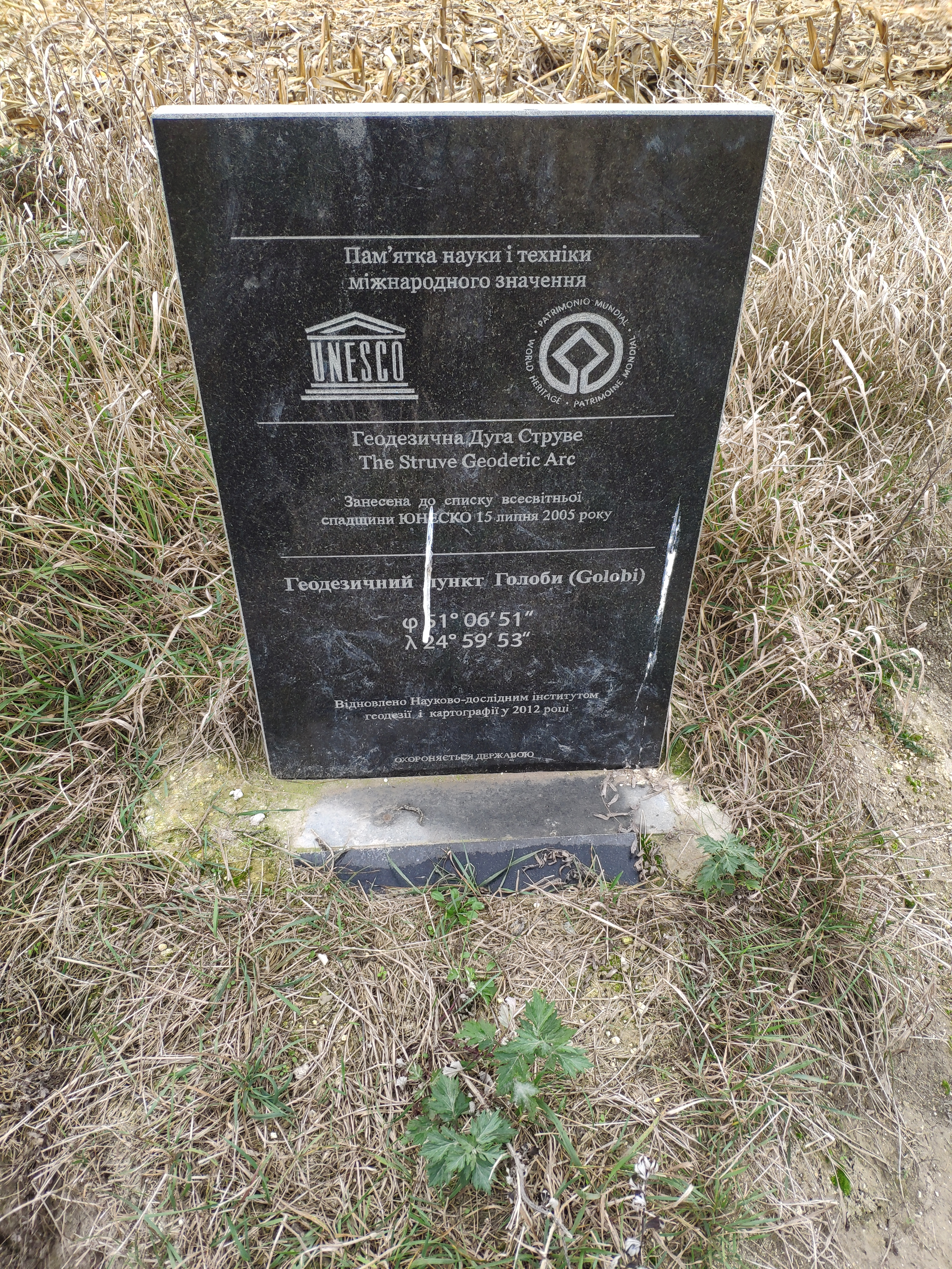 Дуга Струве